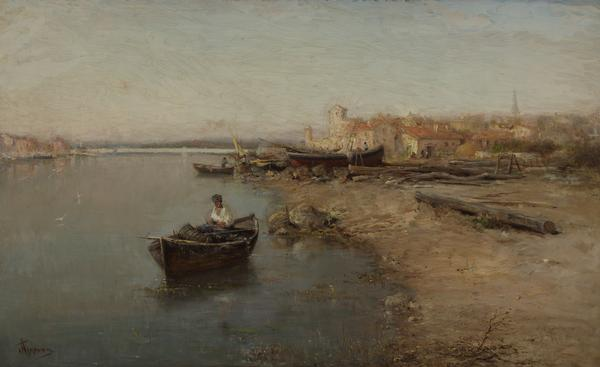 Вечер в Мартиг